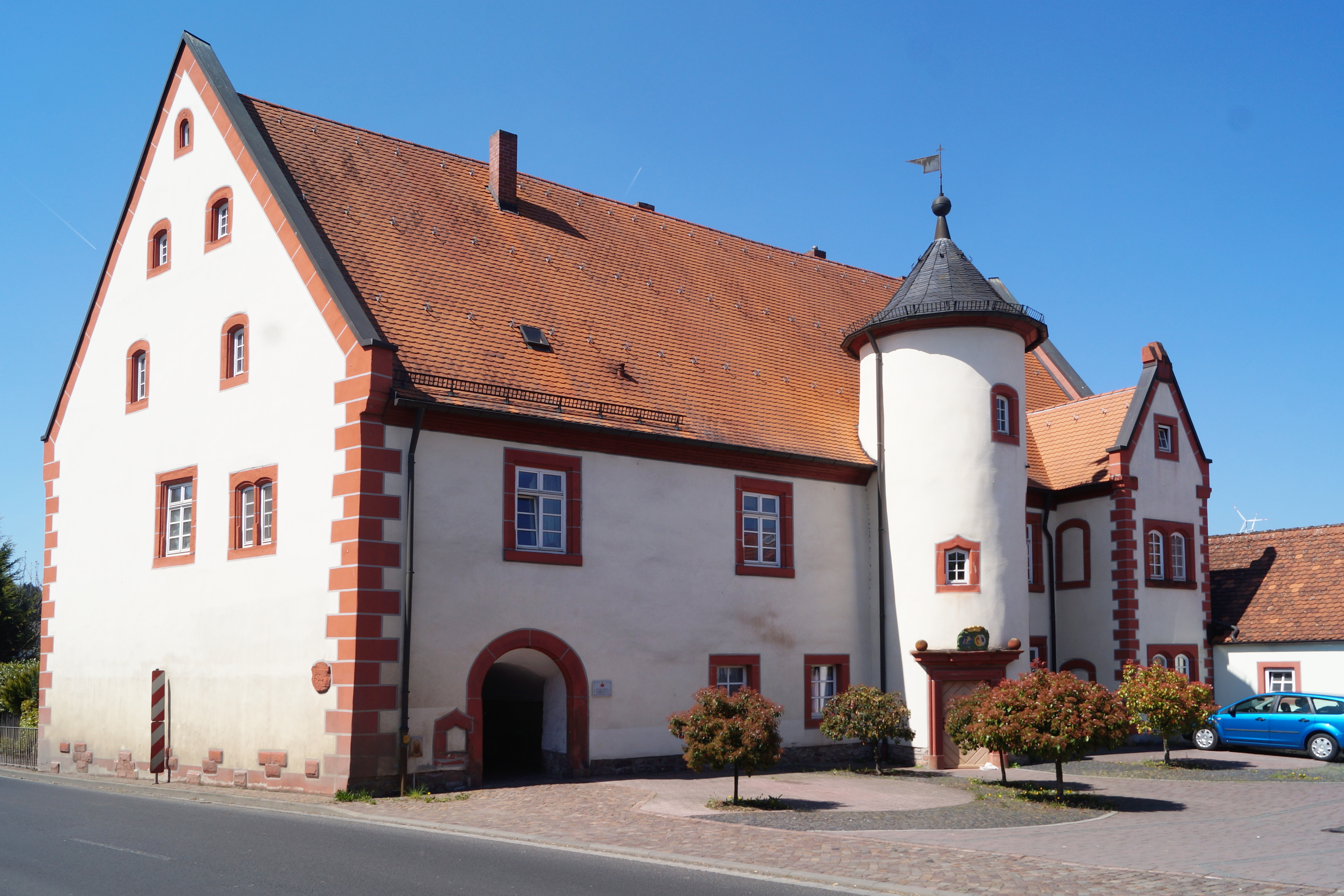 Schloss Wirtheim, Gde. Biebergemünd, Hessen, Ansicht von Ostsüdost